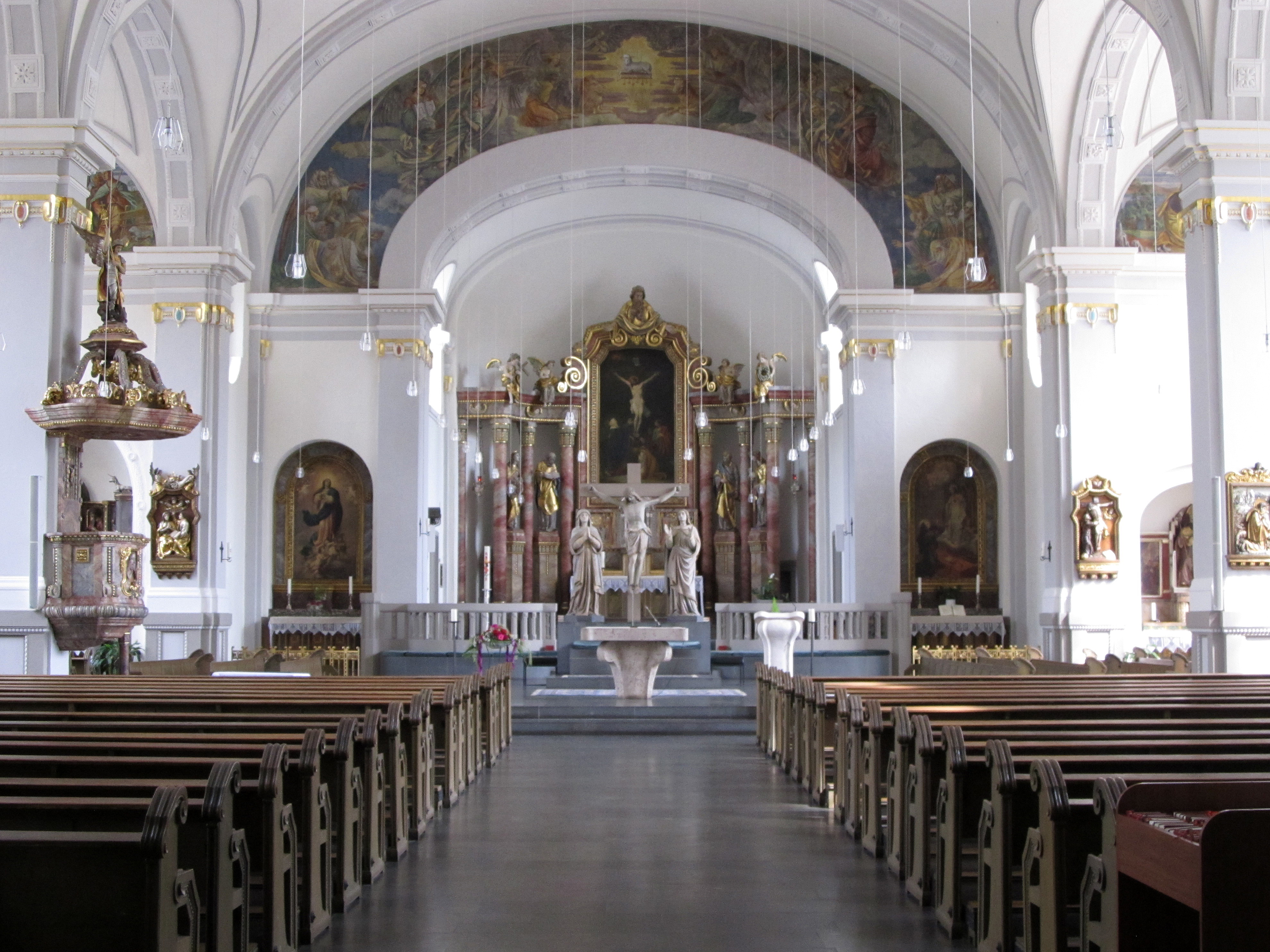 Blick ins Innere der katholischen Pfarrkirche St. Eligius in Völklingen, Saarland.